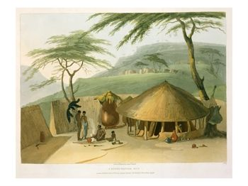 "A Boosh-Wannah Hut" = "A Bechuana Hut"